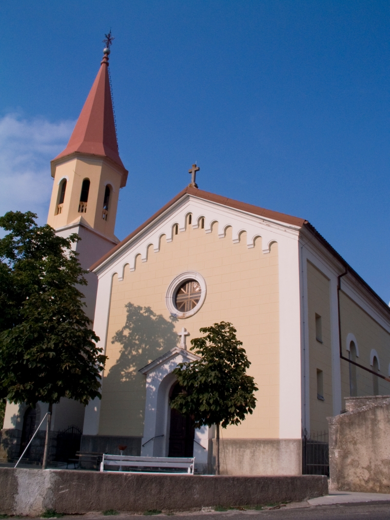 crkva u Svetom Vidu - Miholjice kod Malinske na otoku Krku